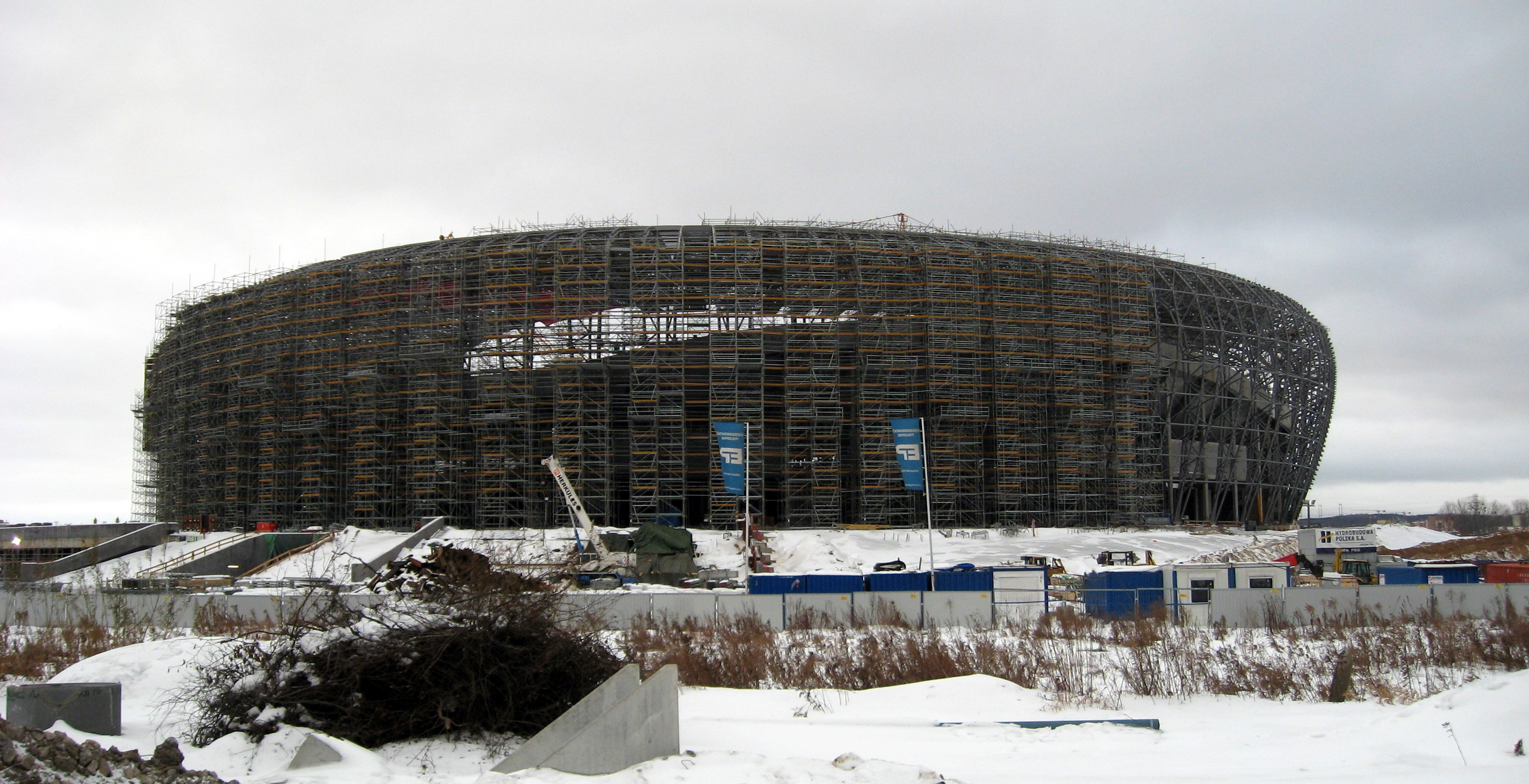 Stadion Baltic Arena w budowie, stan na styczeń 2011